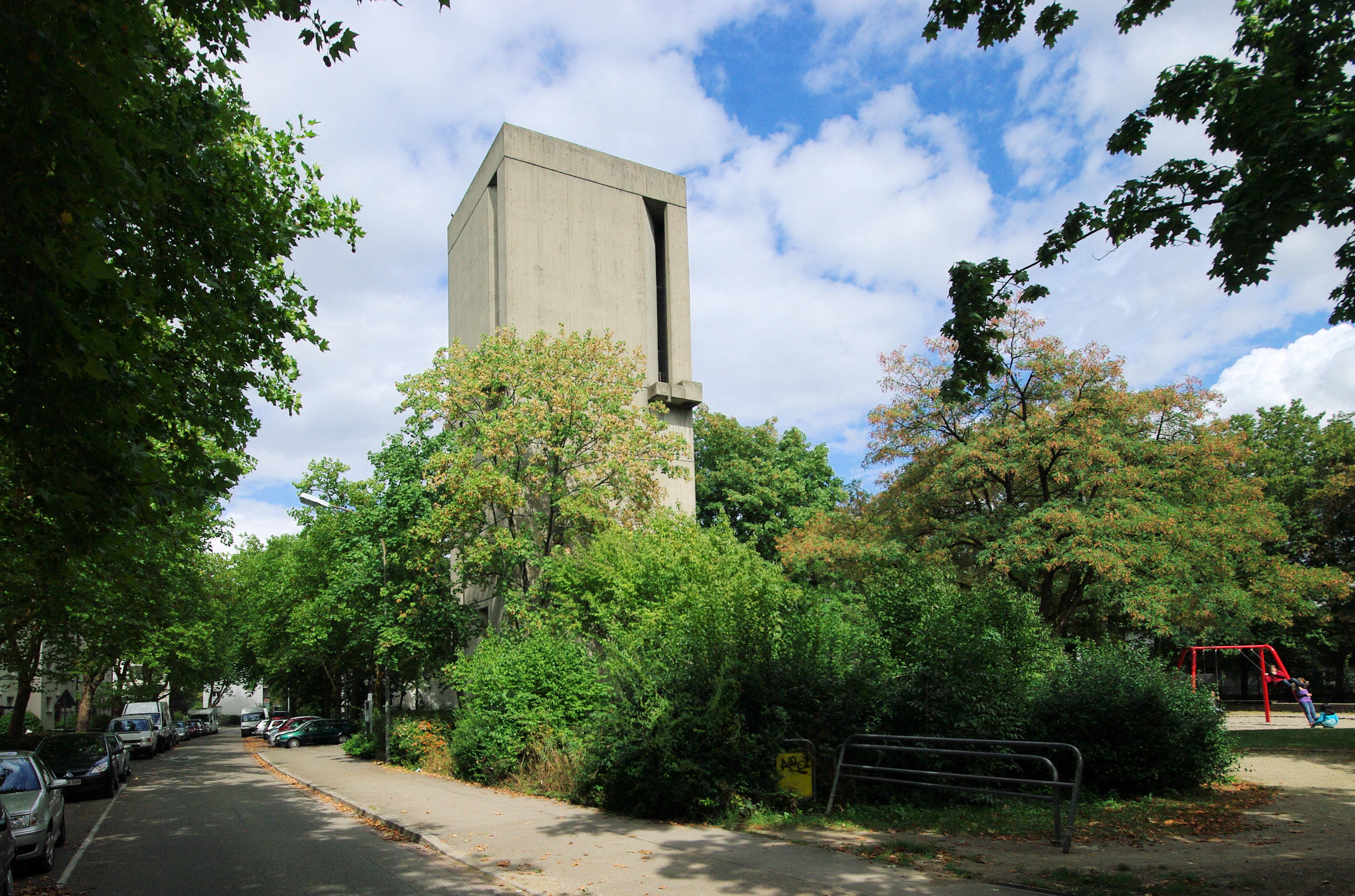 Kirchturm vonSt. Elisabeth